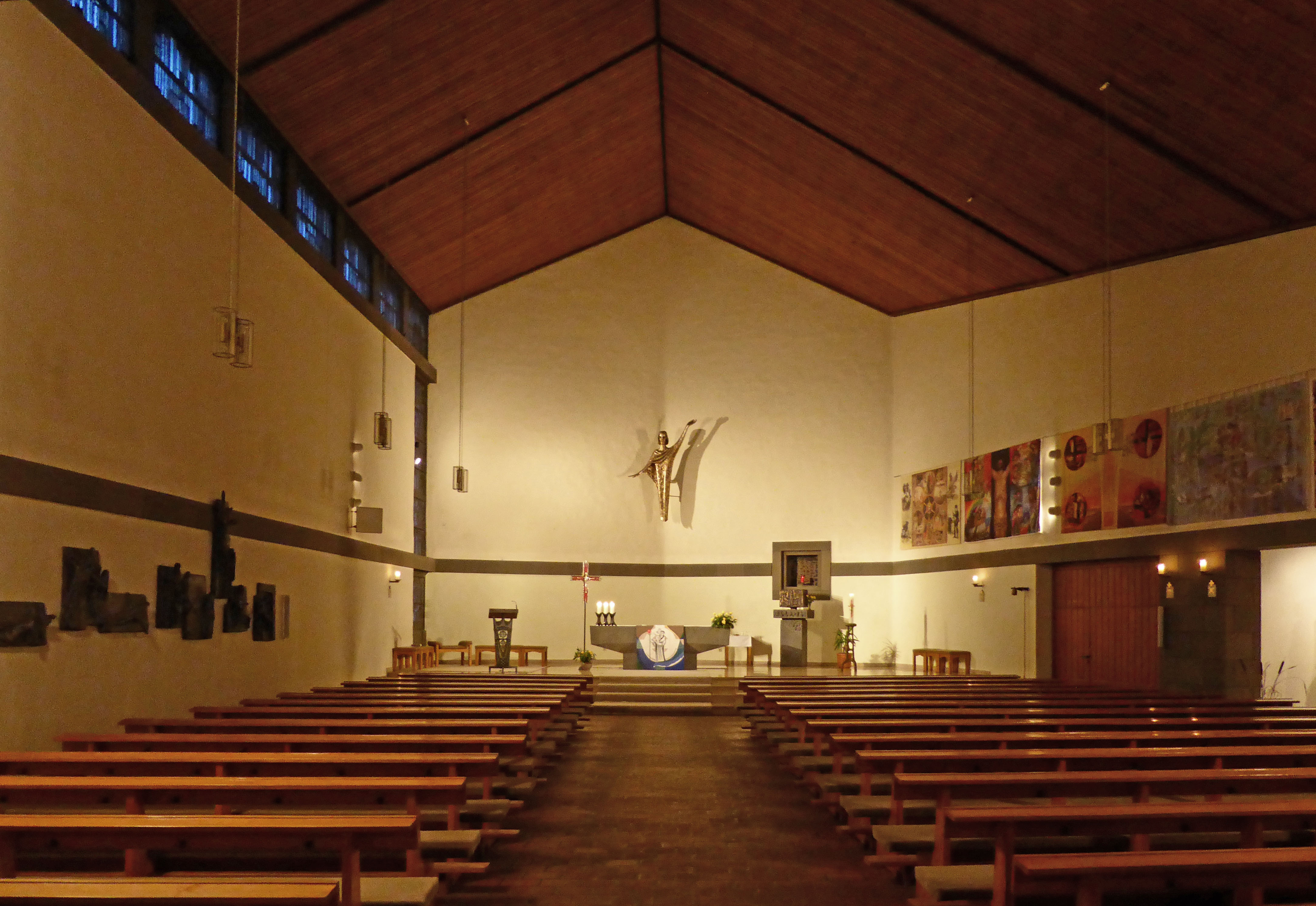 St.-Christophorus-Kirche (Hannover-Stöcken)